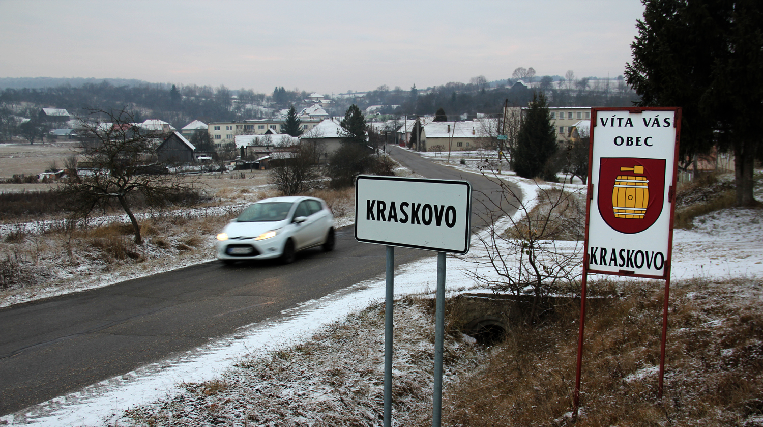 Kraskovo - obec v okrese Rimavská Sobota